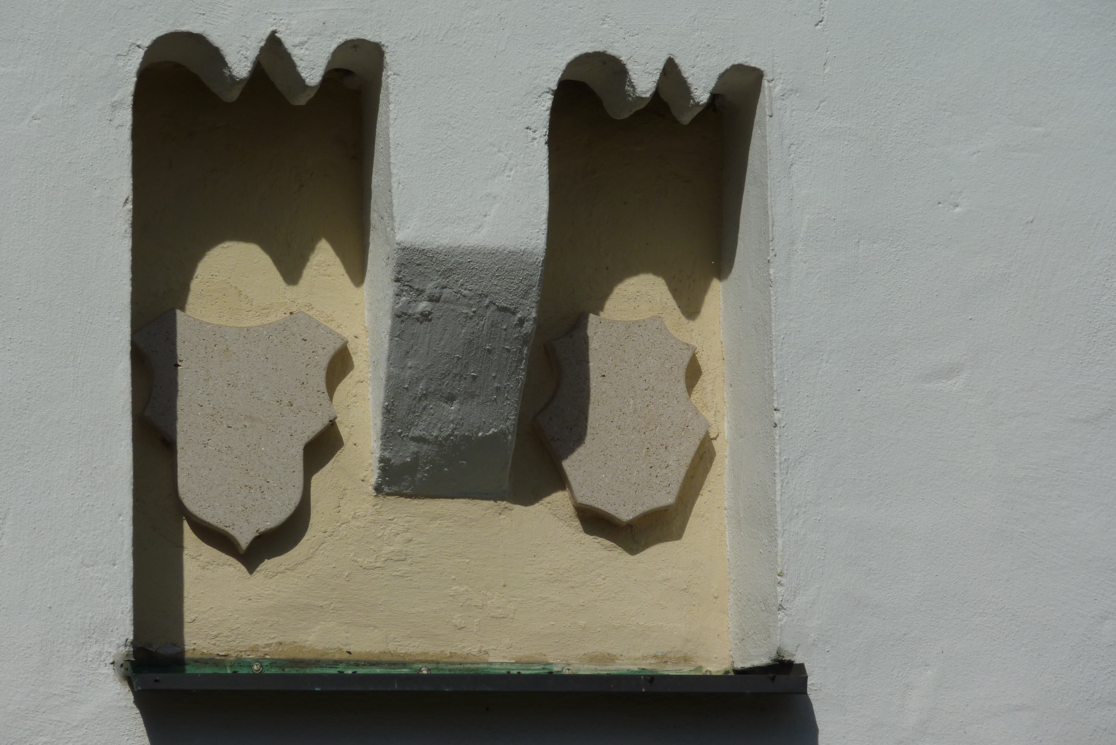 Katholische Pfarrkirche St. Sixtus in Weisingen (Holzheim bei Dillingen an der Donau), Wappenkartuschen in gekoppelter Kielbogennische an der Südseite des Turmes